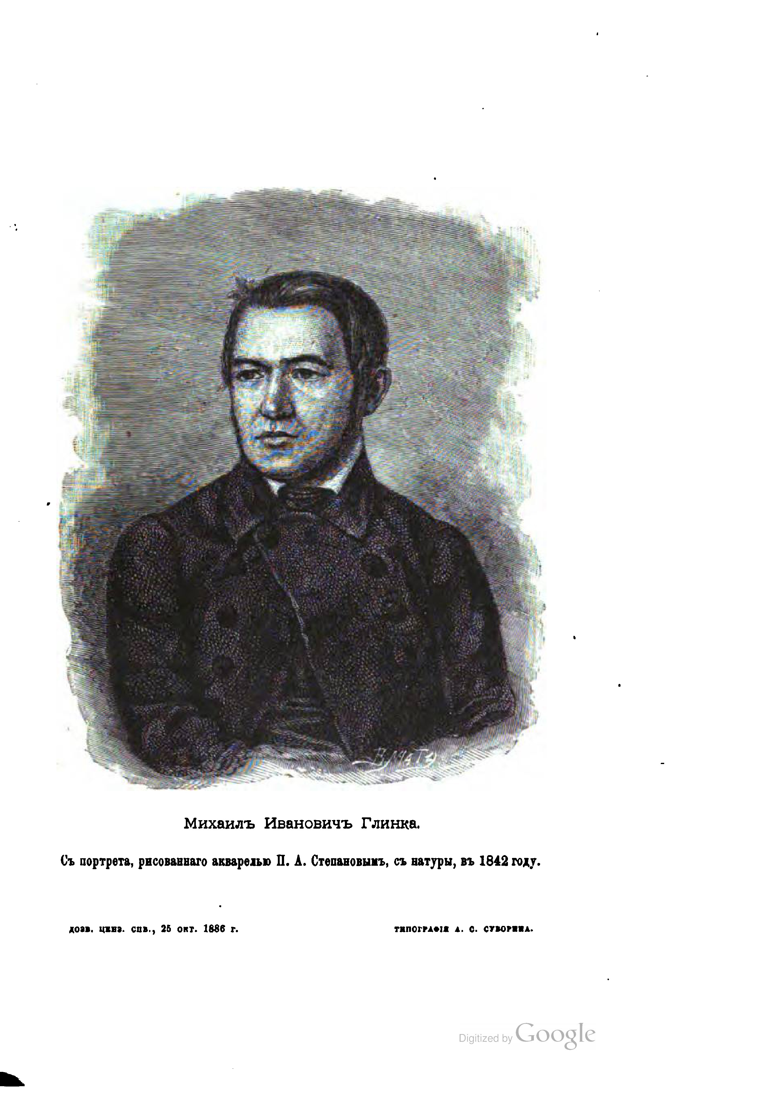 Михаил Иванович Глинка